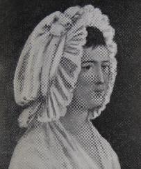 Norwegian first female teacher Hilchen Sommerschild (1756-1831)